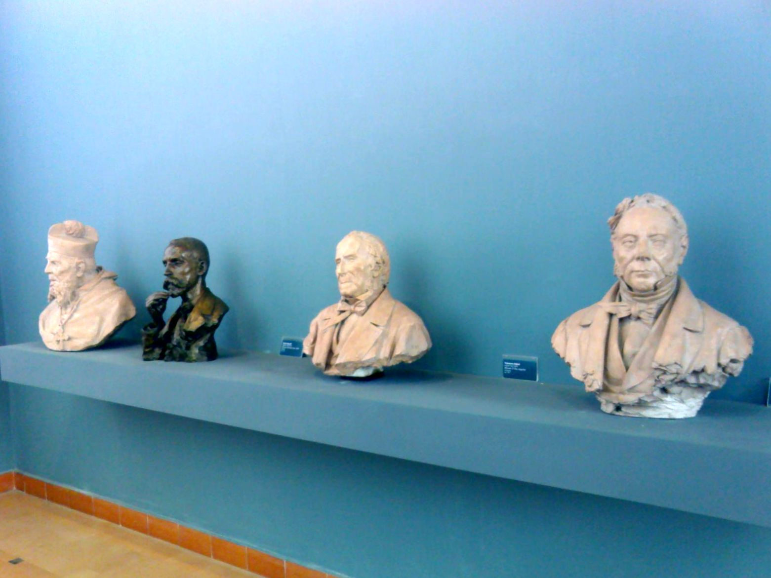 Accademia di Belle Arti di Napoli - La galleria dell'accademia. Sculture, da destra a sinistra: Nicola Amore (terracotta di Achille D'Orsi), Tito Angelini (terracotta di Tommaso Solari), Paolo Veti (bronzo 1890, di Mario Rutelli), Arcivescovo Sutter (terracotta 1908, di Stanislao Lista).